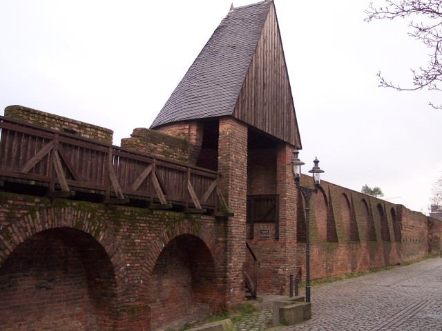 Duisburg Teil der alten Stadtbefestigung